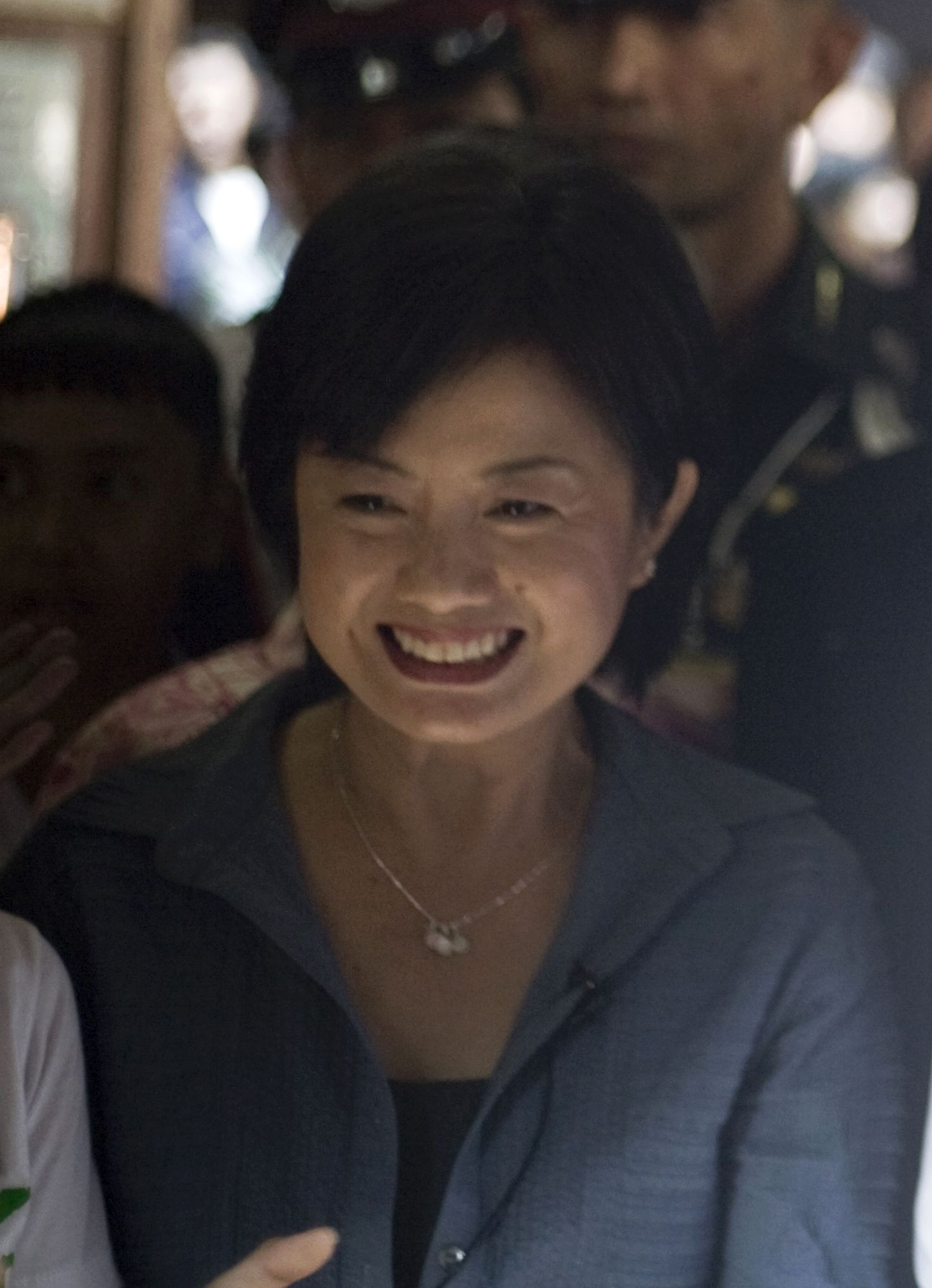 นิรมล เมธีสุวกุล / นายกรัฐมนตรี เป็นประธานในพิธีรับมอบรางวัลอนุรักษ์มรดกทางวัฒนธรรมในภูมิภาคเอเชีย แปซิฟิก ประจำปี 2552 ณ สามชุกตลาดร้อยปี อำเภอสามชุก จังหวัดสุพรรณบุรี 11ธันวาคม 2552 (The Official Site of The Prime Minister of Thailand Photo by พีรพัฒน์ วิมลรังครัตน์)